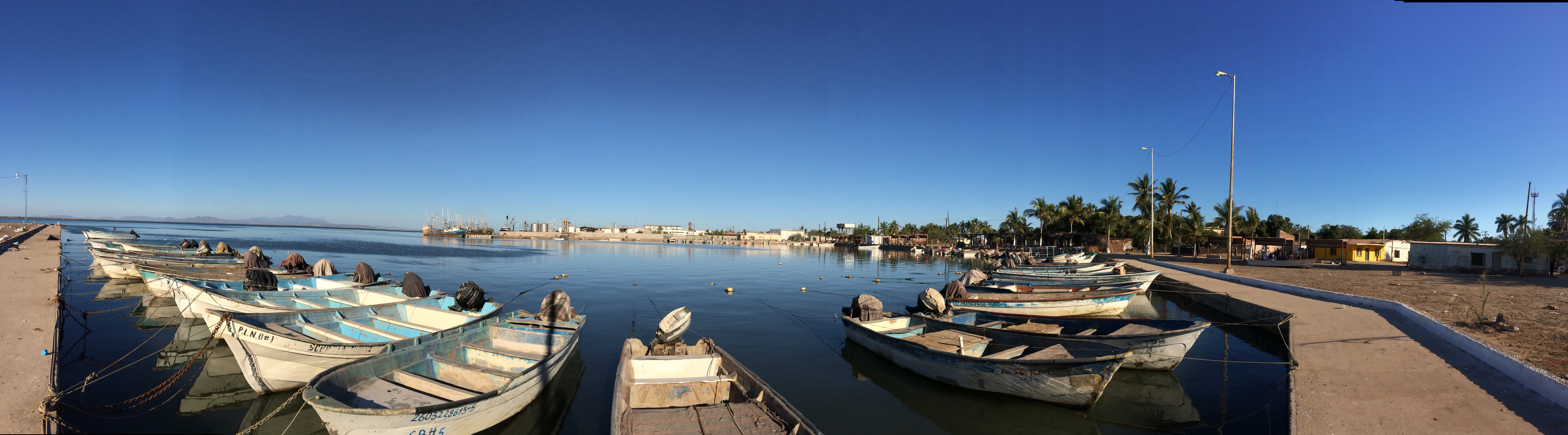 foto panorámica tomada desde el malecón de Yavaros.